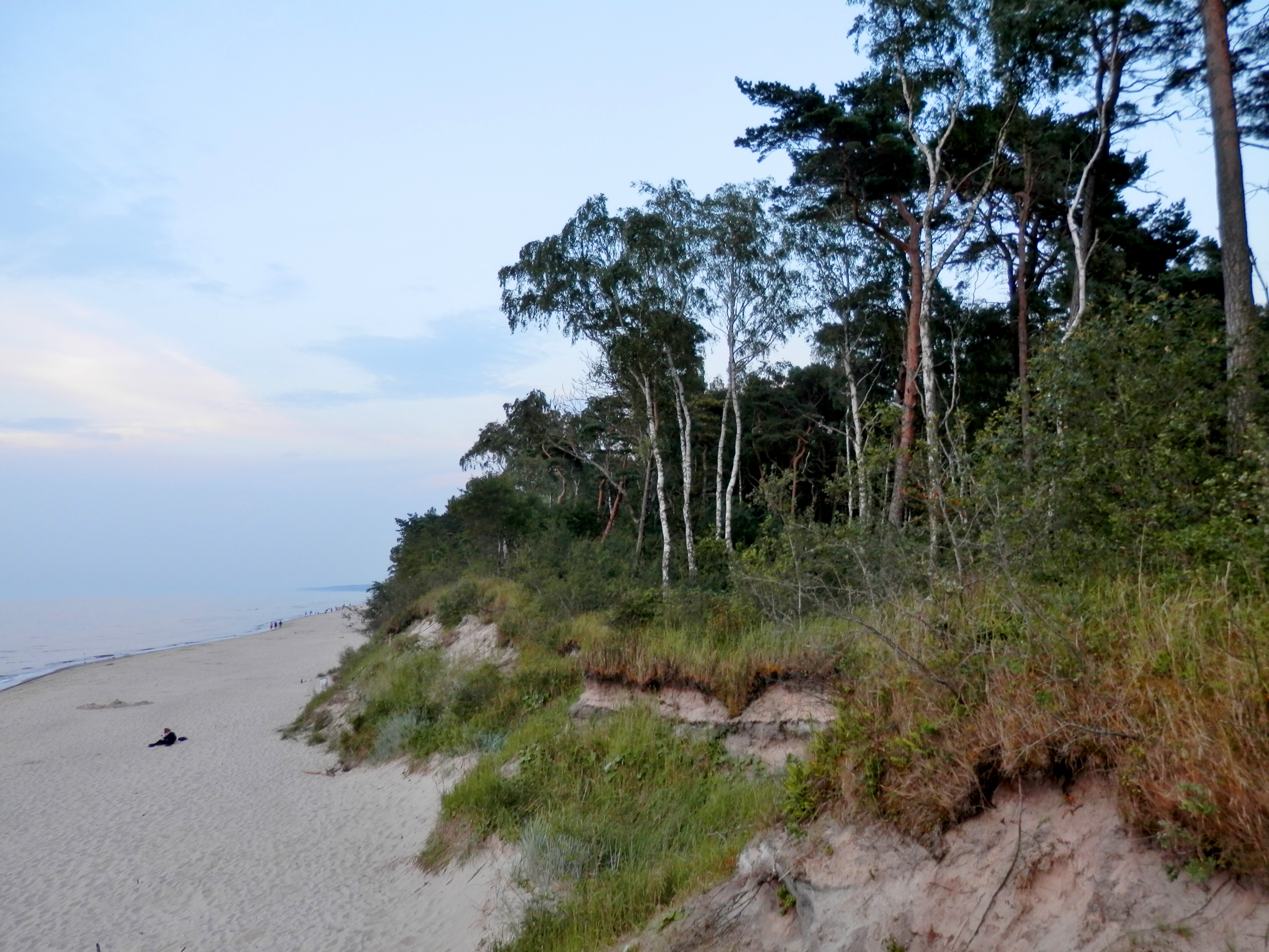 Łukęcin, Poland